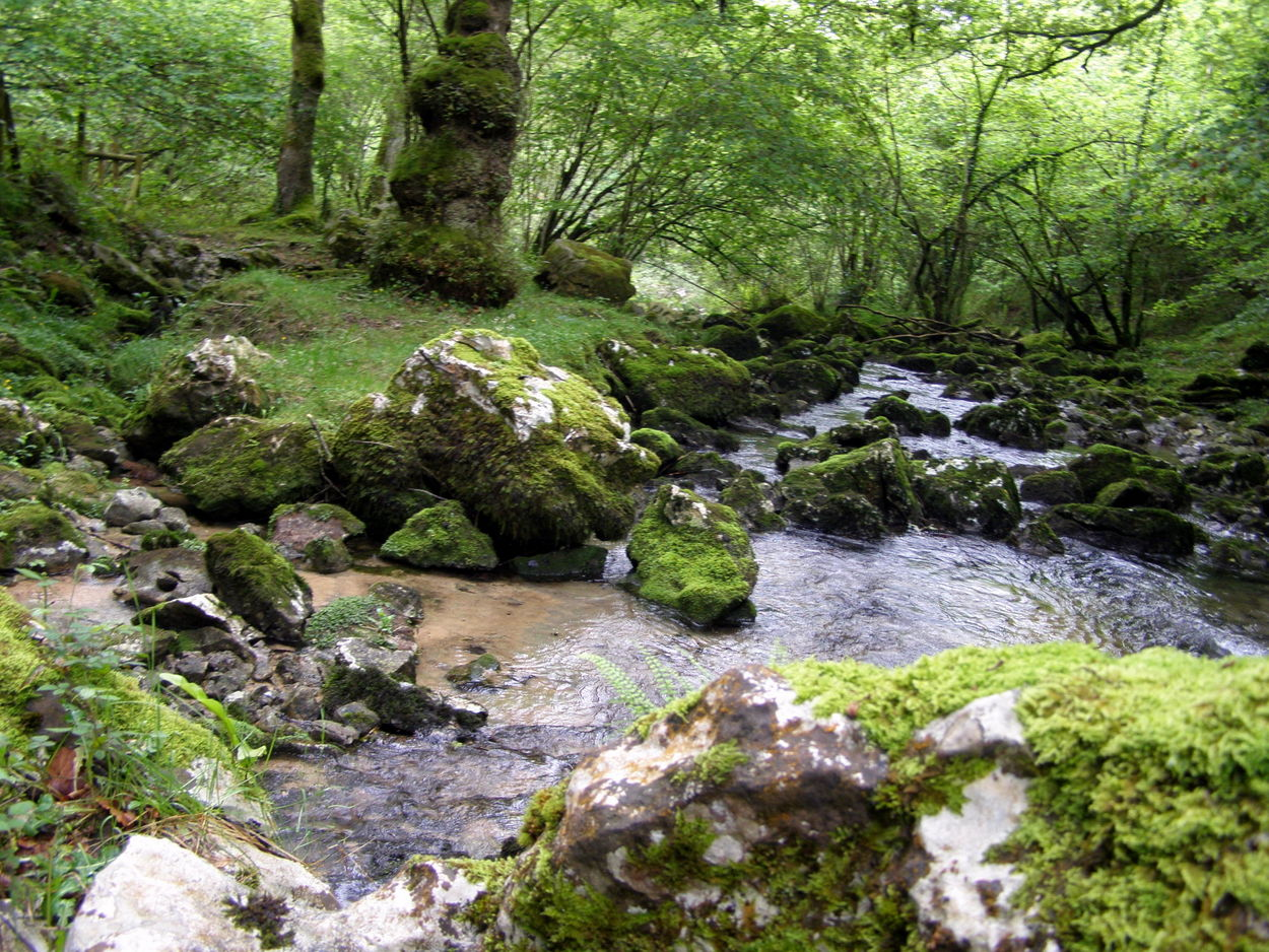 Curso medio del río Latarmá